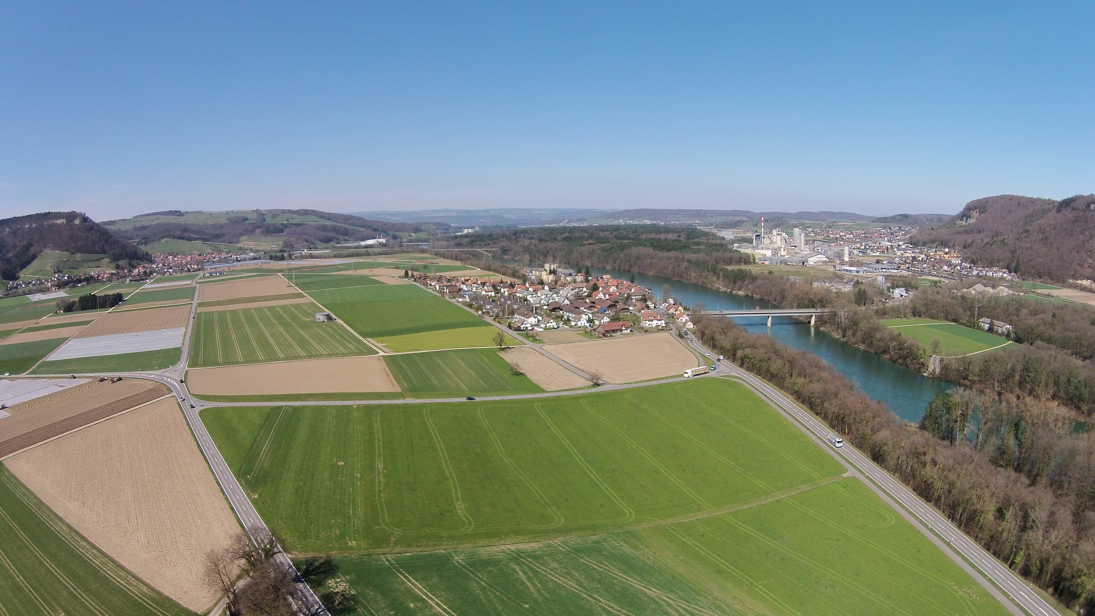 Blick auf Stilli AG, Gemeinde Villigen